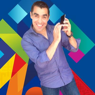 Tiempo de Chiquimarquear